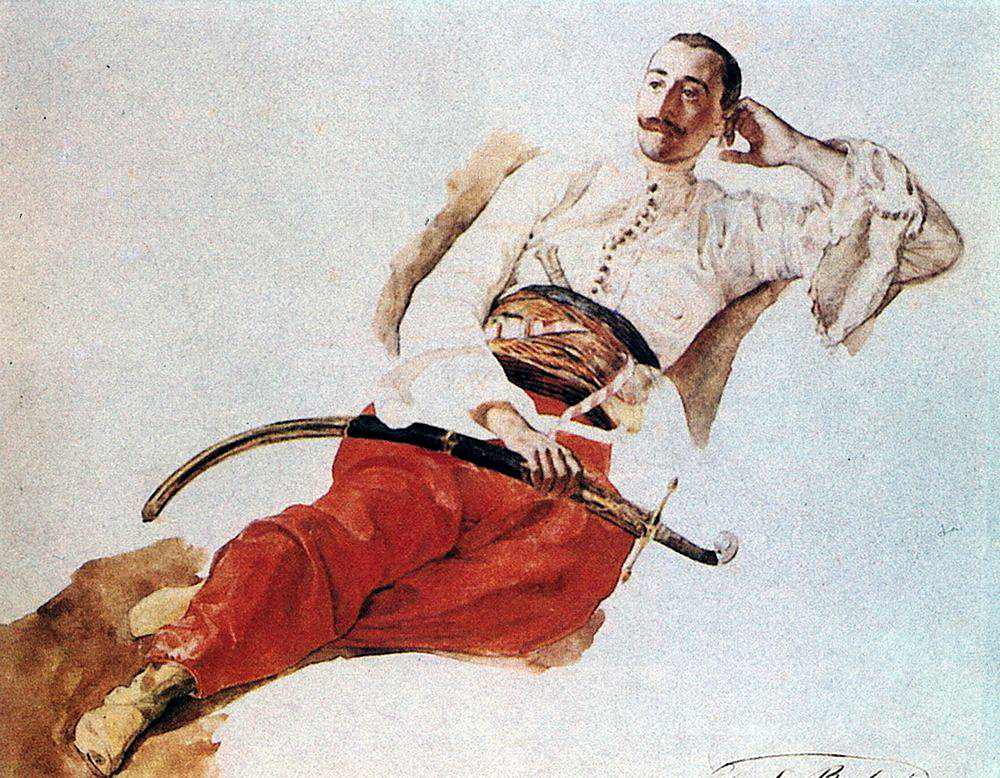 Портрет П. А. Чихачева. 1835